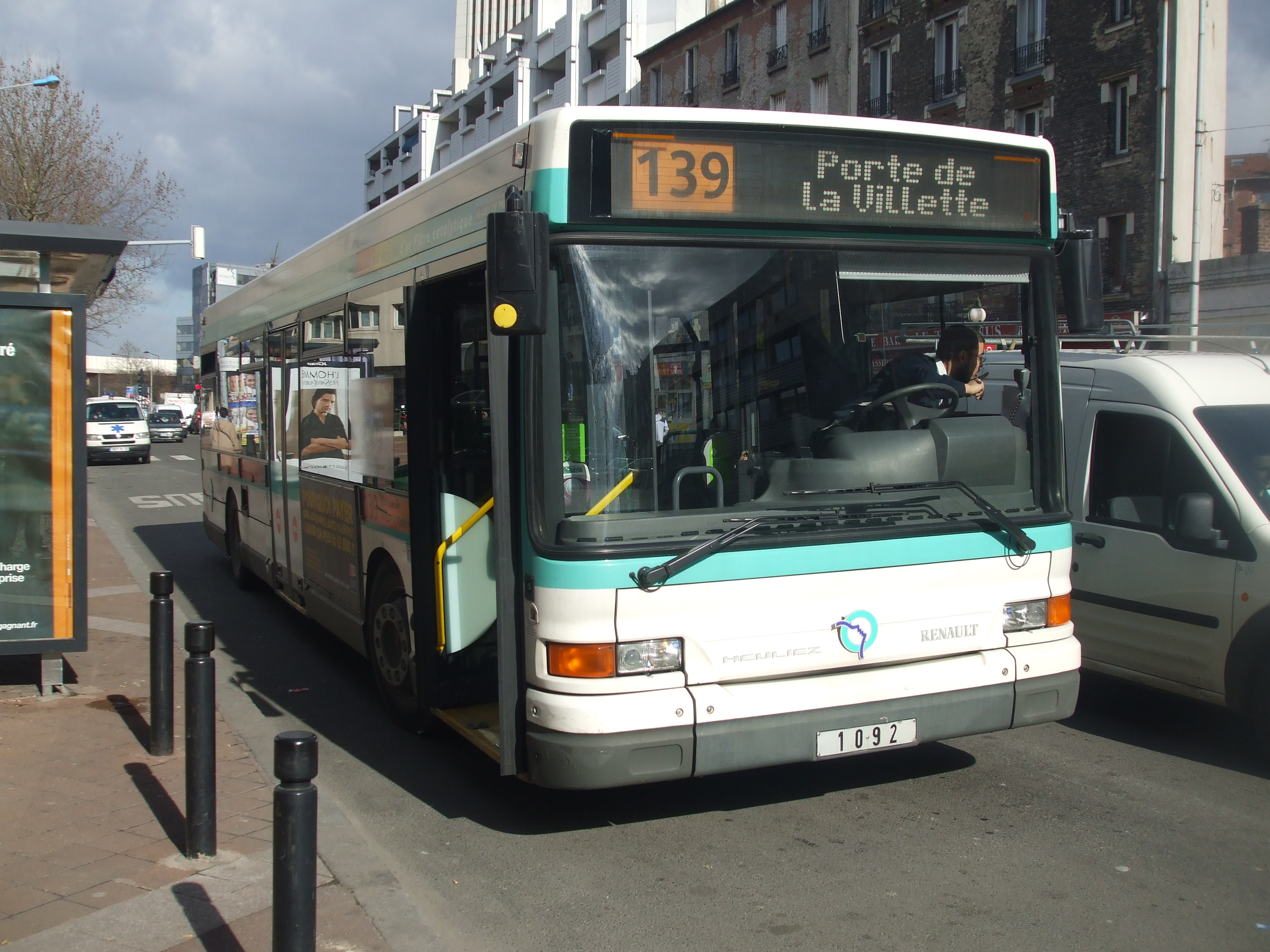 Autobus de type GX 317 2p à Saint-Denis - Carrefour Pleyel (93).